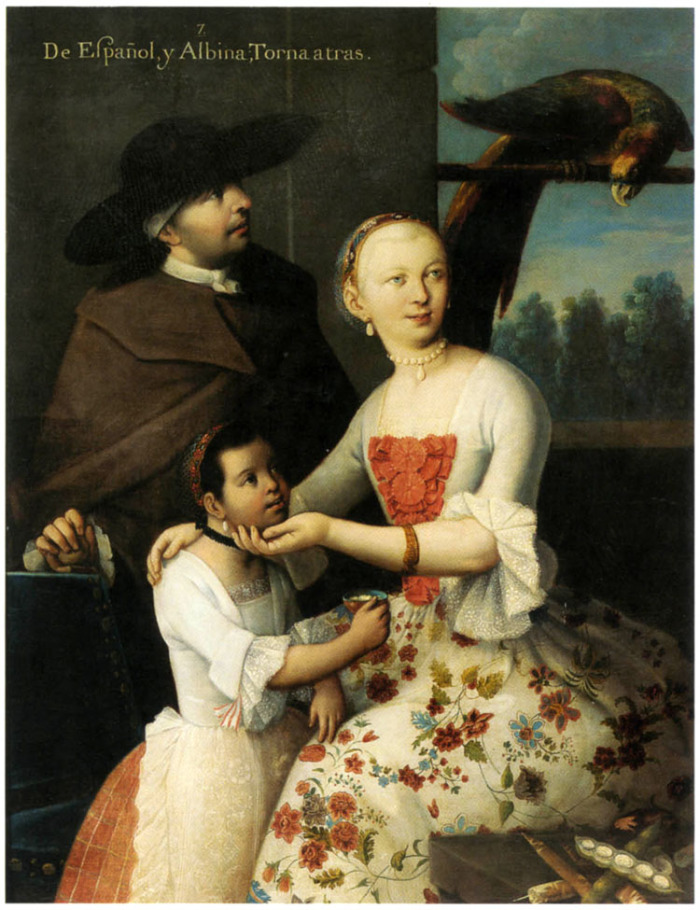 Pintura de Castas, 7. De español y Albina – Torna atrás.